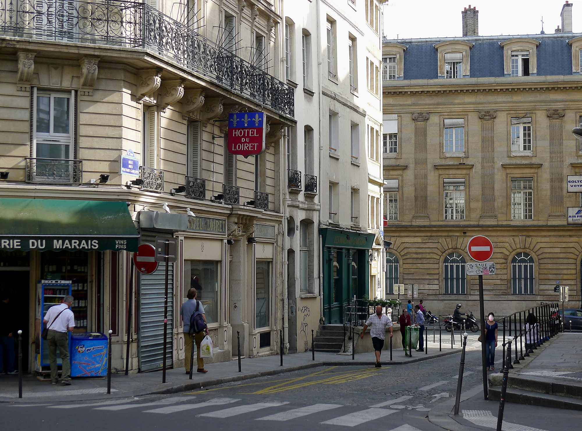 Rue des Mauvais-Garçons - Paris IV